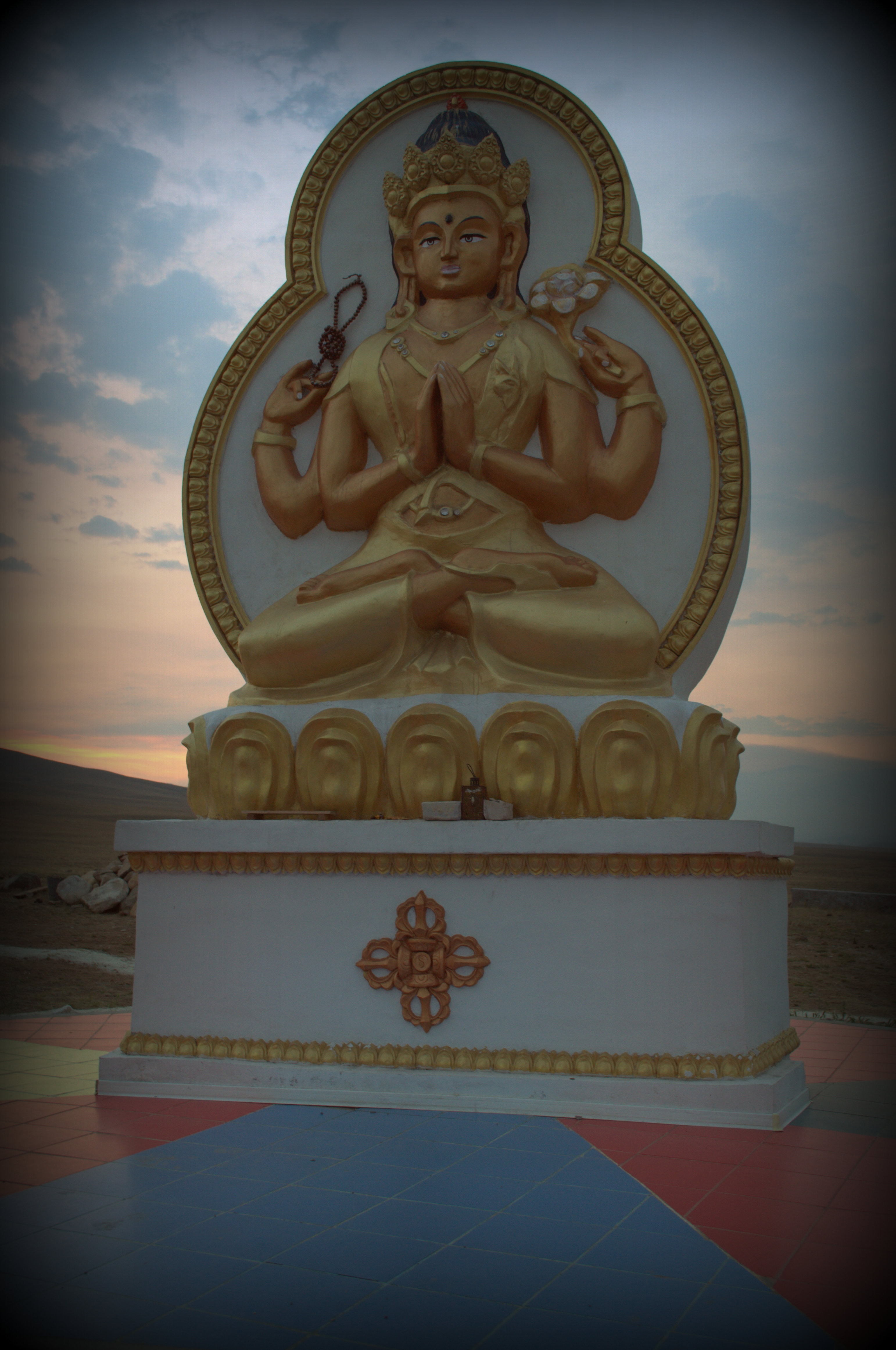 Ацагатский дацан. Заиграевский район, Бурятия, Сибирь